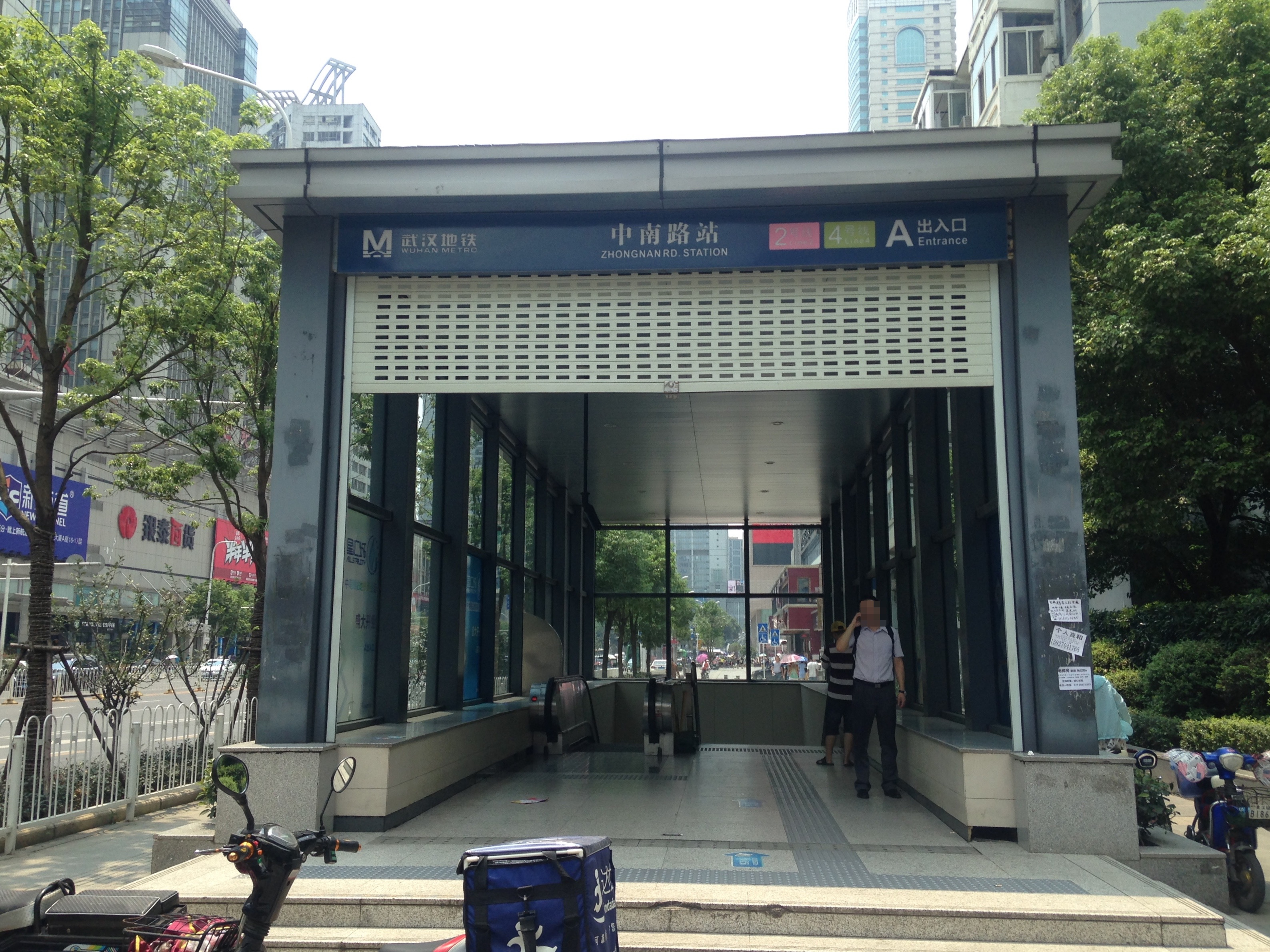 中南路駅の1番出入り口